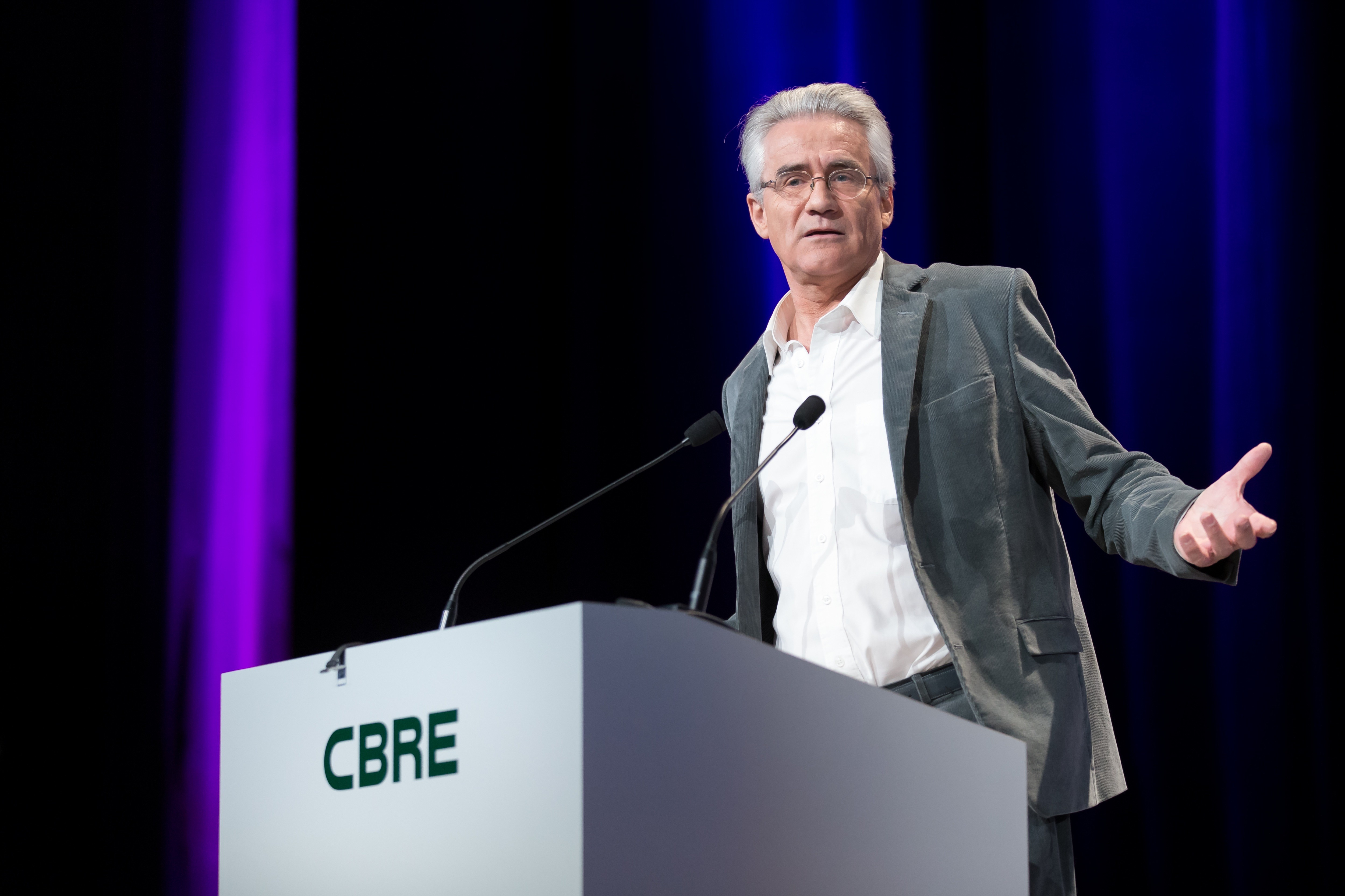 Intervention d'André Comte-Sponville lors du 38ème Forum CBRE.